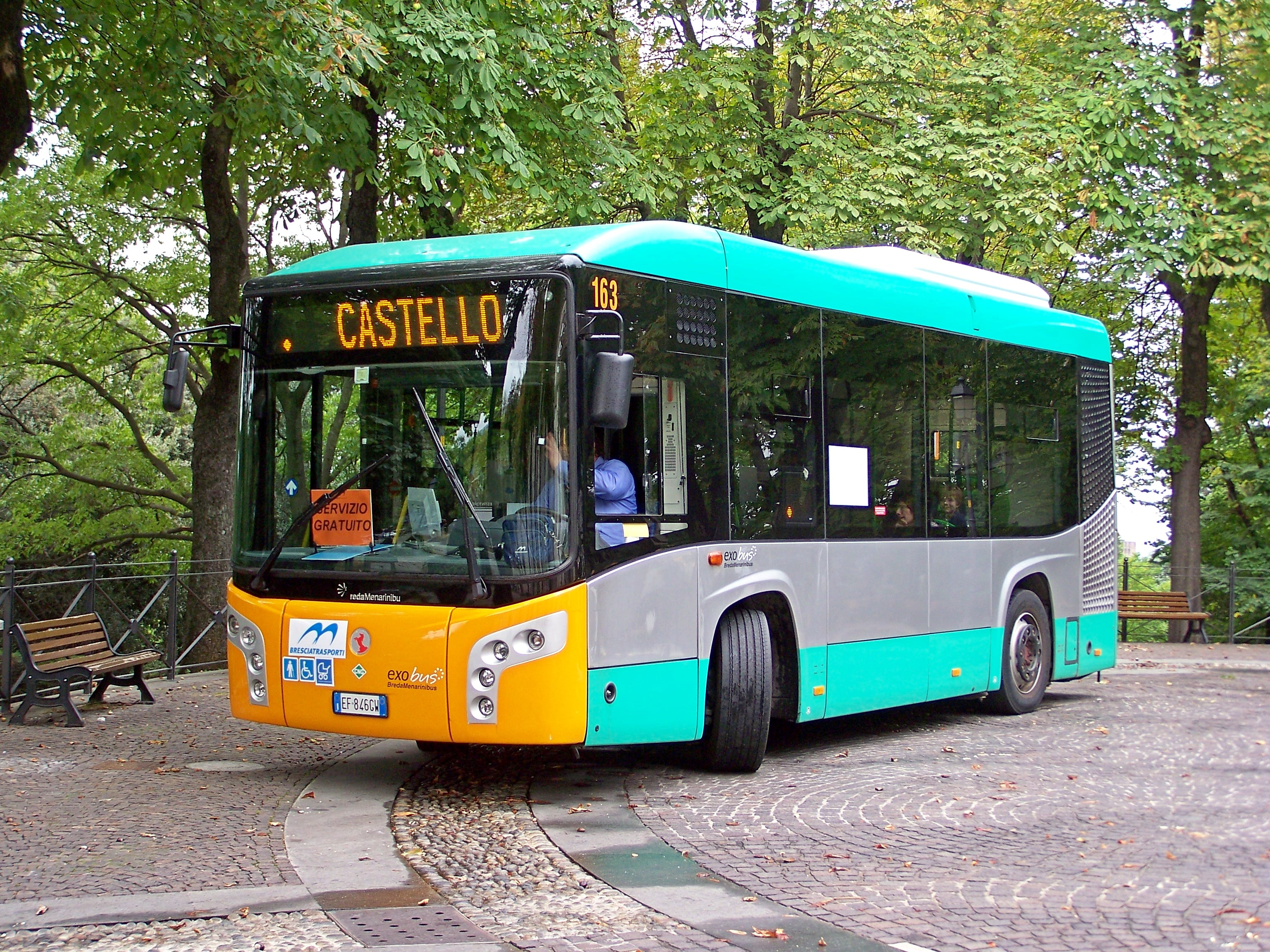 Il BredaMenarinibus Vivacity Plus Exobus in Castello nr. 163 di Brescia Trasporti in sosta presso il piazzale antistante il Castello di Brescia, in attesa di espletare il servizio navetta verso il centro storico